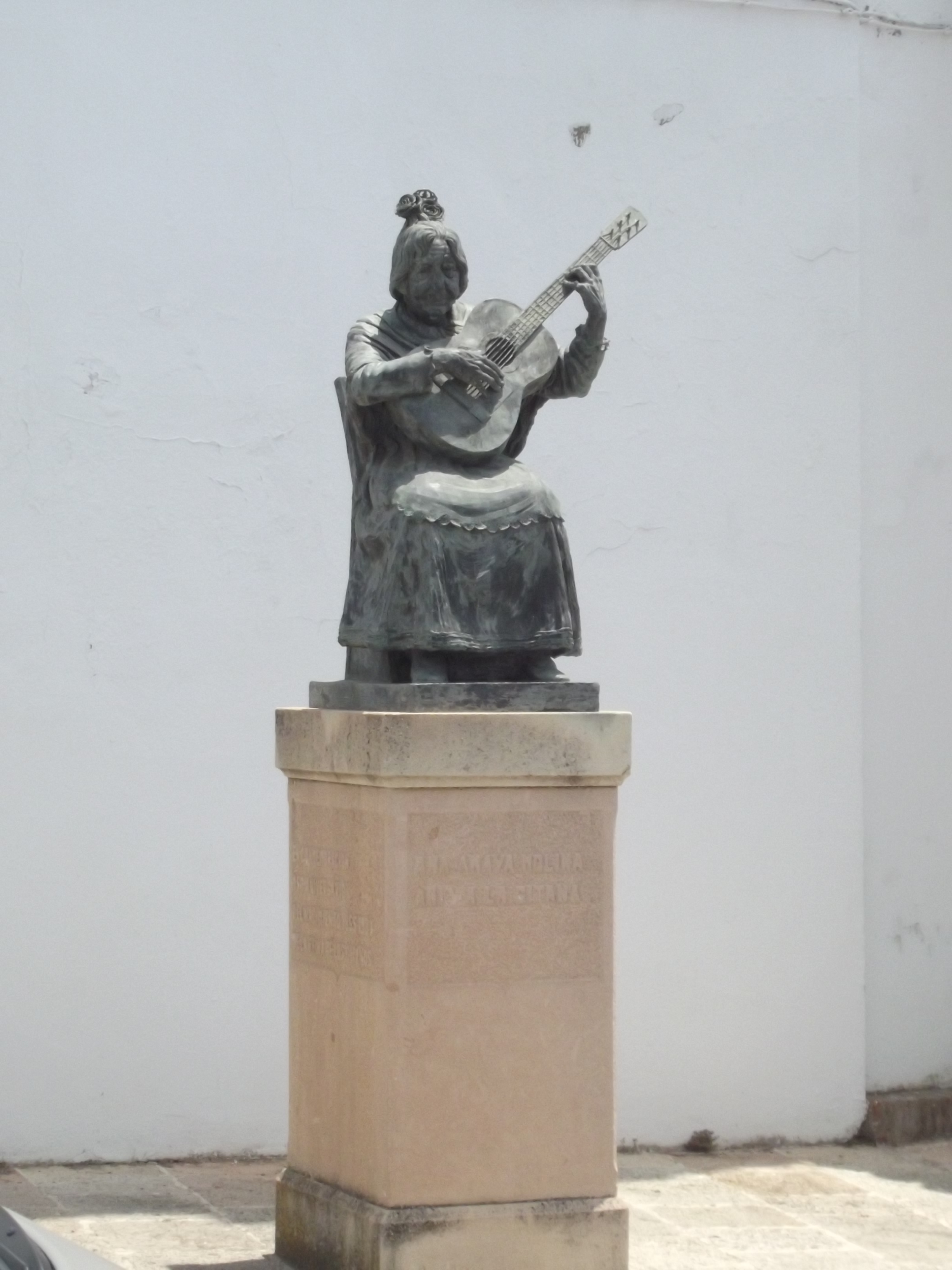 Ronda